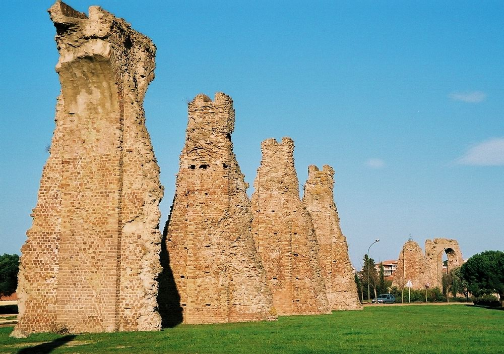 Reste des römischen Aquädukts von Fréjus (Pfeiler von Sainte Croix)